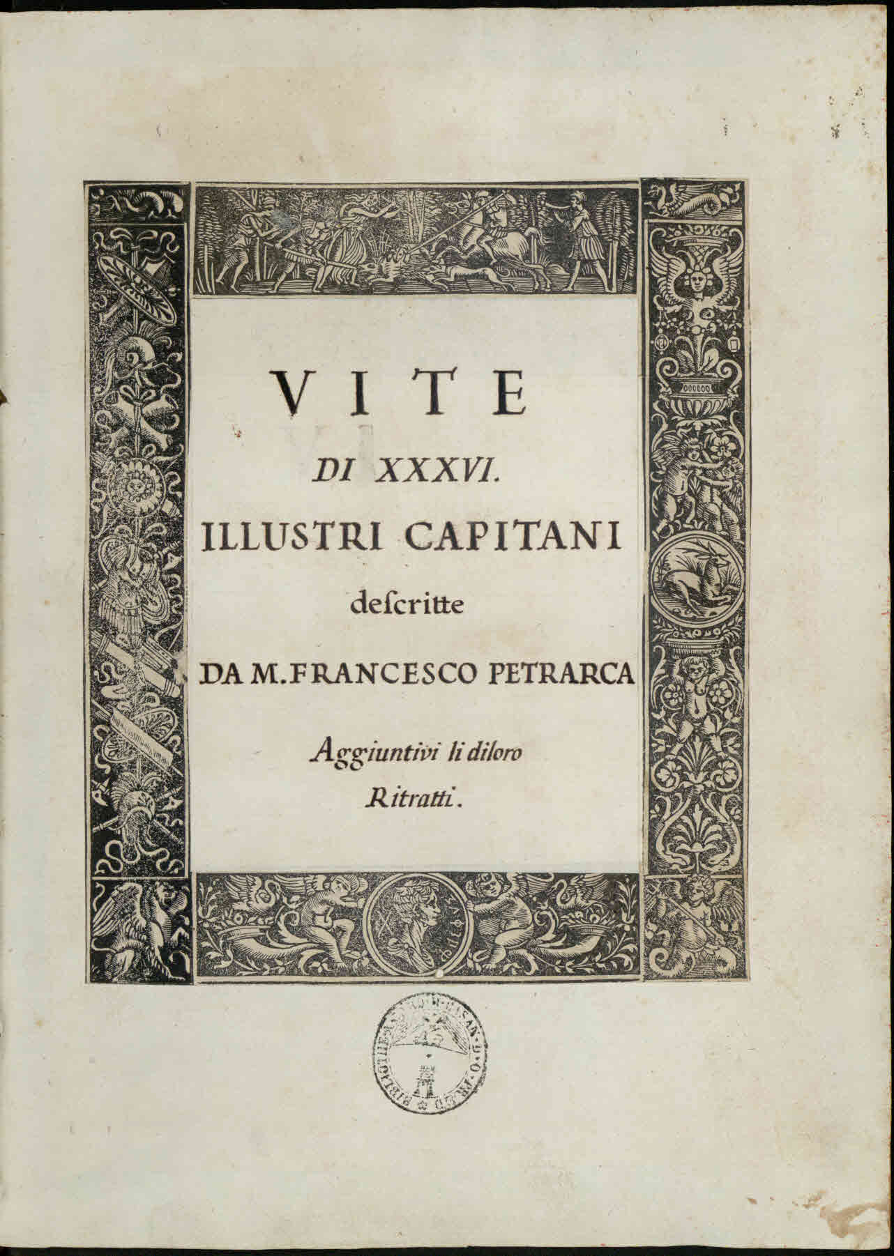 De viris illustribus (italiano). - rure Polliano : Antiquarius istud aere Felix impressit fuit Innocens Ziletus adiutor sociusq[ue]…, MCCCCLXXVI kl octobris. - 240 c. ; [*]⁴, [a]¹⁰, [b]⁴, c-h⁸, k⁸, l-m⁶, o-p⁸, /⁸, ss⁸, S-V⁸, X-Y⁶, [rum]⁶, q-x⁸, &⁸, Z¹⁰, z¹⁰ ; fol. - Esistono copie varianti con diverso impianto tipografico di c. 5 (BMC). - A. Contò, Tipografia veronese del Quattrocento, in Mantegna e le arti a Verona, a cura di S. Marinelli e P. Marini, Verona 2006, pp. 455-56, n° 188. - L'"Antiquario" Felice Feliciano veronese. Tra epigrafia antica, letteratura e arti del libro. Atti del Convegno di studi, Verona, 3-4 giugno 1993, a cura di A. Contò e L. Quaquarelli, Padova 1995, pp. 289-312 (Medioevo e Umanesimo, 89). - Iniziale e cornice miniate a c. [a]1r. - Inizialette a penna di colore rosso e blu, talvolta miniate su foglia d'oro .